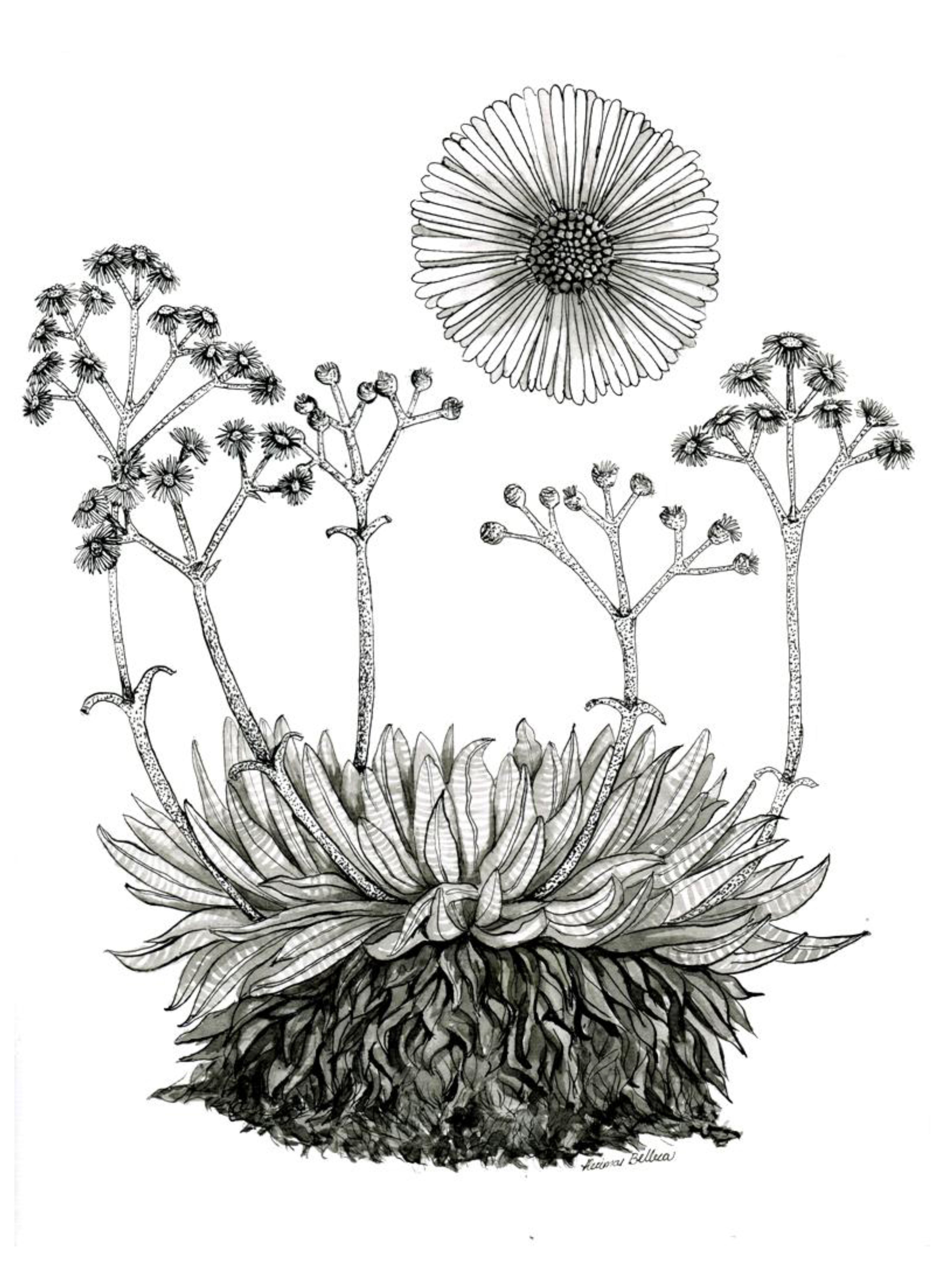 Espeletia schultzii comunmente llamada Frailejon,pertenece a la familia Asteraceae. Es endémica de Los Andes venezolanos. Los frailjones caracterizan la vegetacion de superpáramo en el Parque Nacional Sierra Nevada del Estado Mérida en Venezuela Es un caulirrosuleto que alcanza 2 m de altura. Hojas alternas, oblongas hasta oblongo-lanceoladas, lanuginosas en ambas caras, 20-40 cm largo y 3-6 cm ancho. Sinflorescencias axilares amarillas y vistosas. La ilustracion fue hecha con tinta china sobre cartulina de hilo.